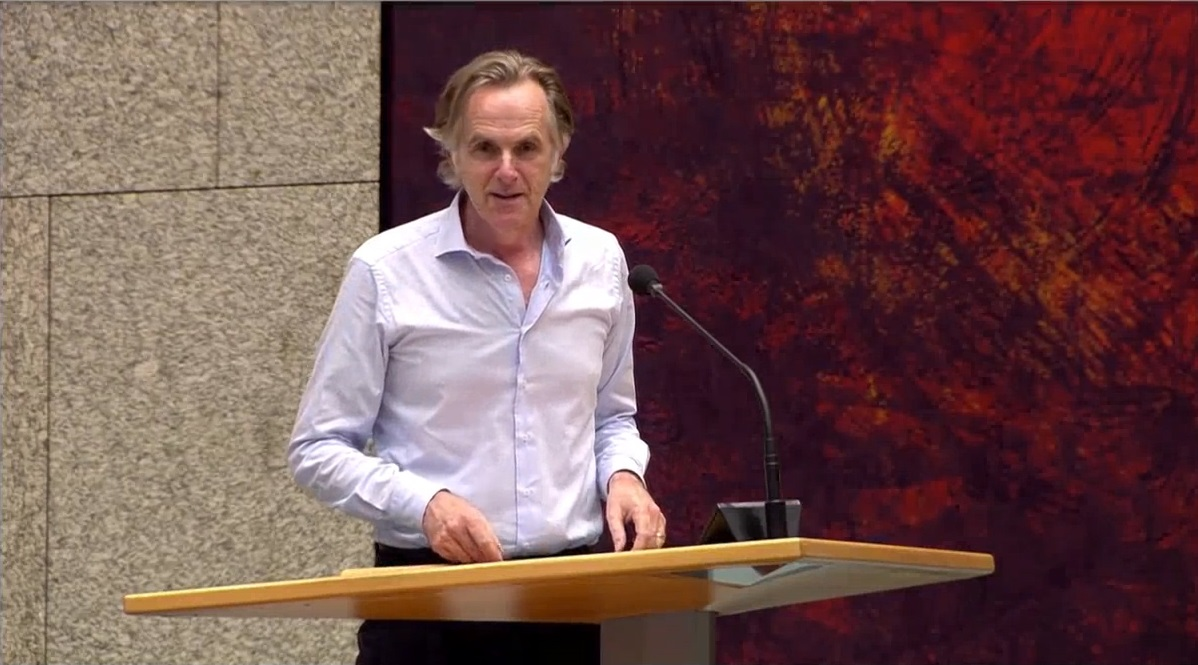 Hitte op het Binnenhof. Wat doe je dan als Kamerlid? Trek je een jasje aan? Sokken? Daarover verschillen de mannelijke Kamerleden over van mening.